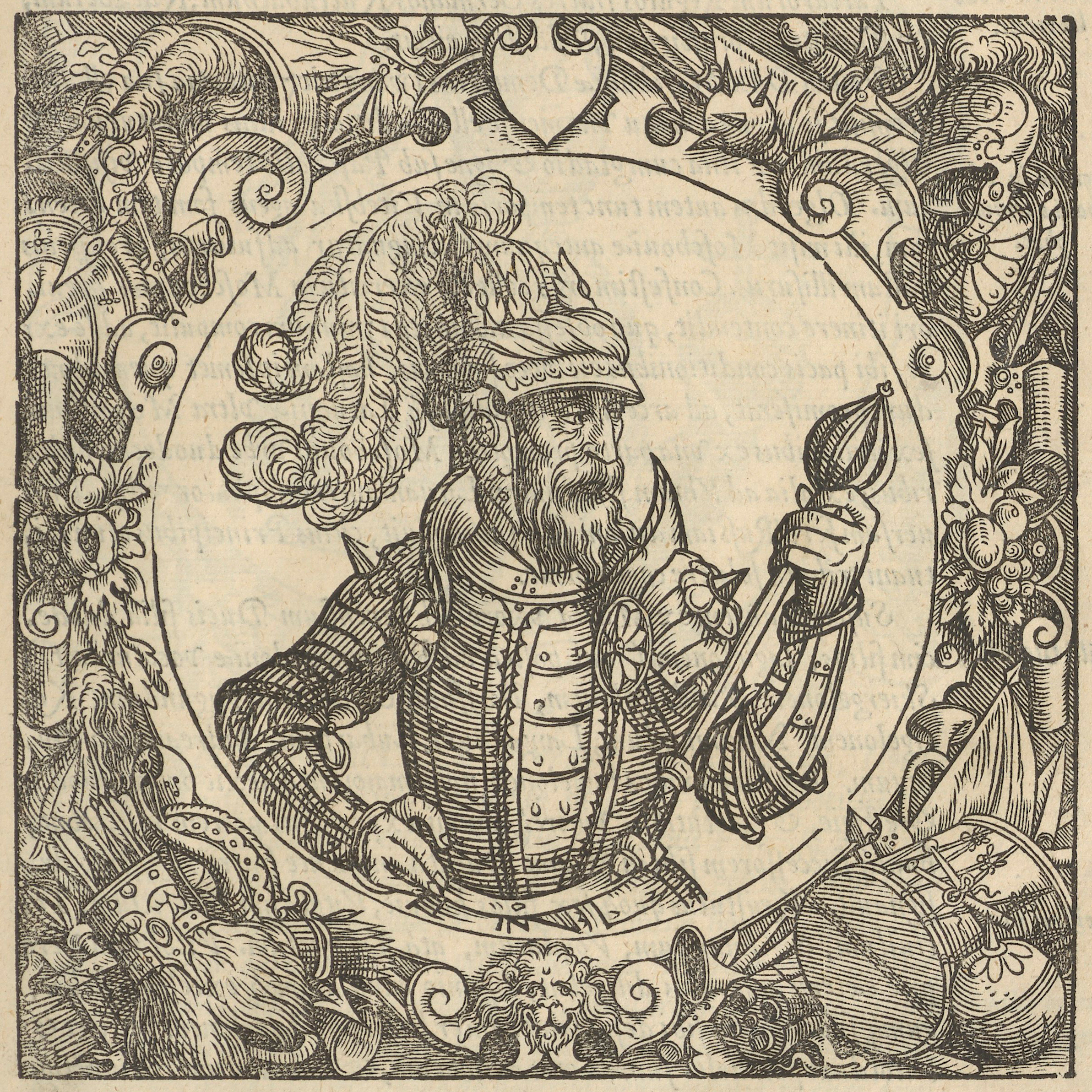 Беларуская (тарашкевіца): Уяўны партрэт вялікага князя Альгерда (Algierd)